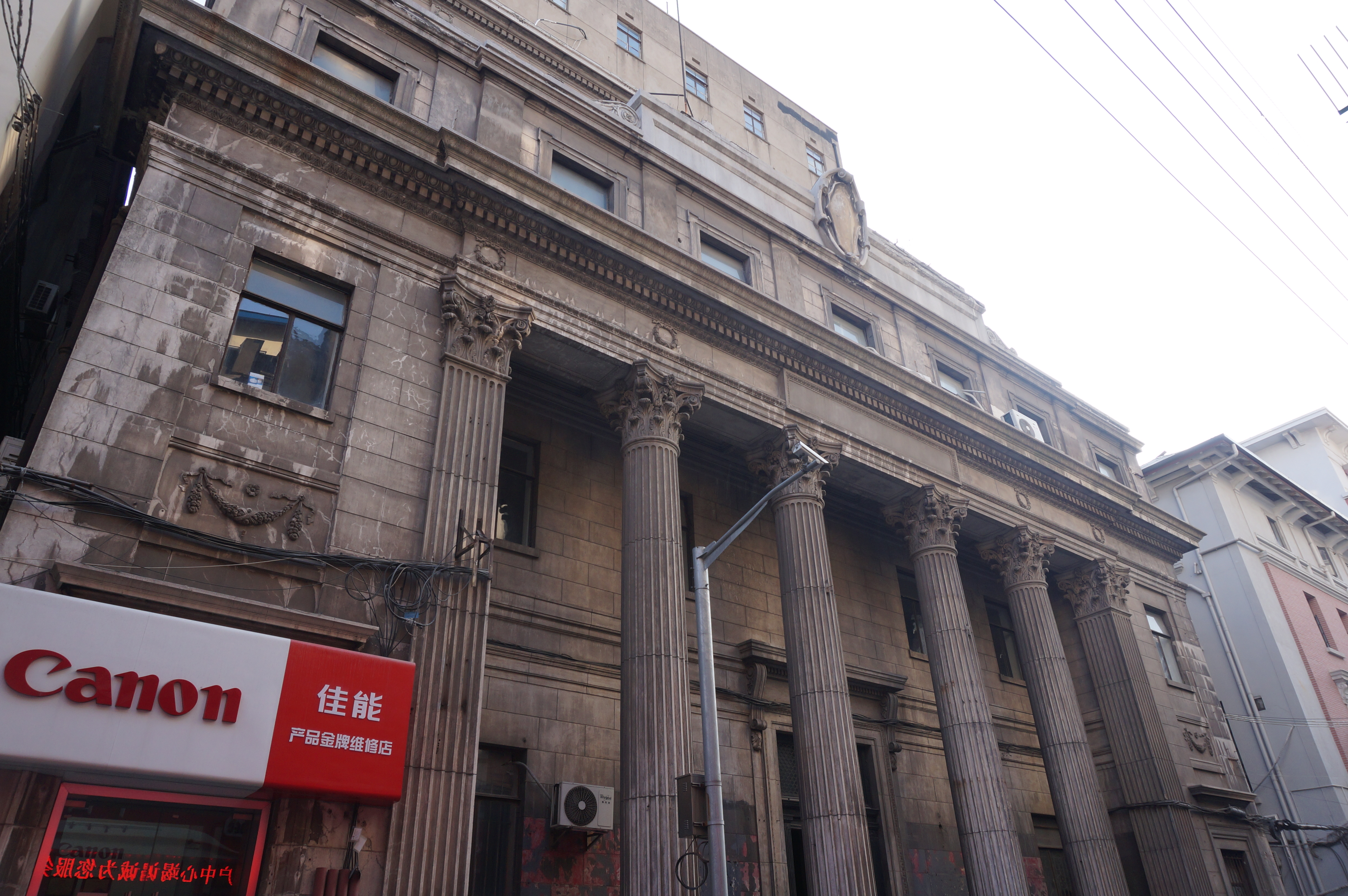 中文（中国大陆）: 原上海银行公会大楼